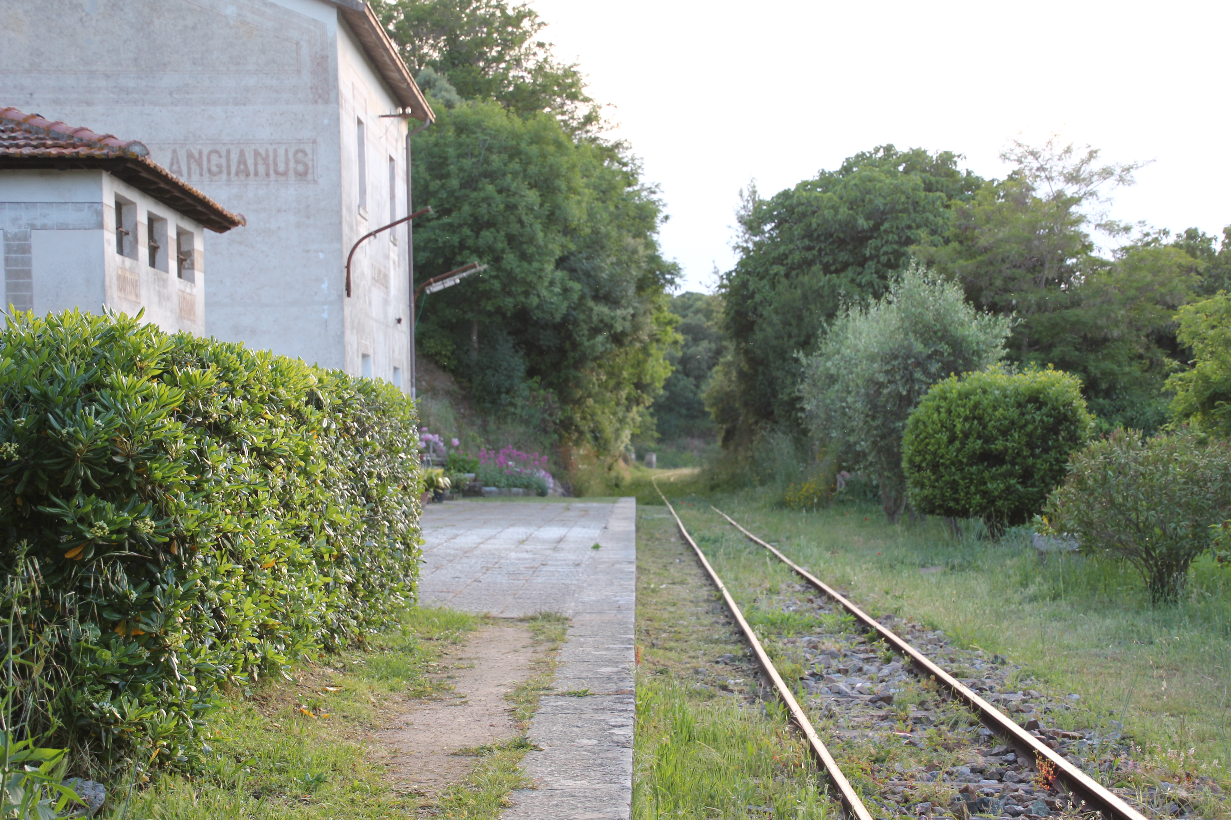 Calangianus - Stazione ferroviaria